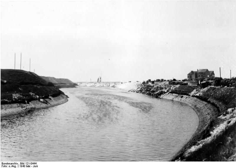 Nahe der Küste